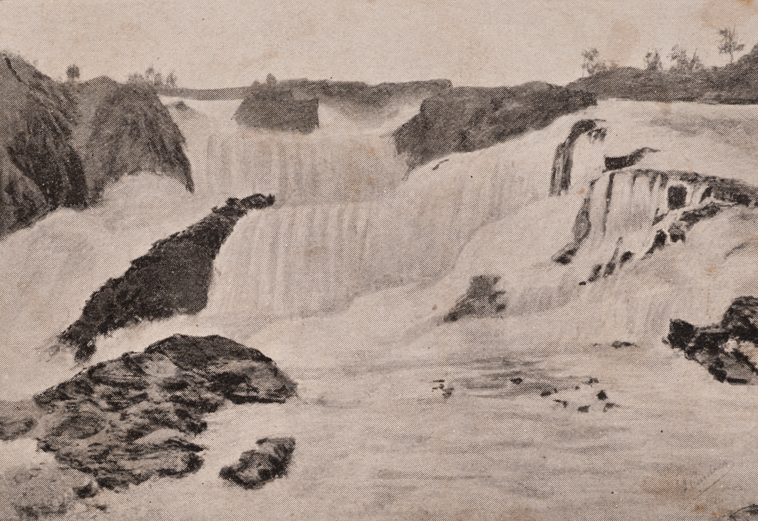 Obra que integra o acervo do Museu Paulista da USP. Coleção João Baptista de Campos Aguirra.